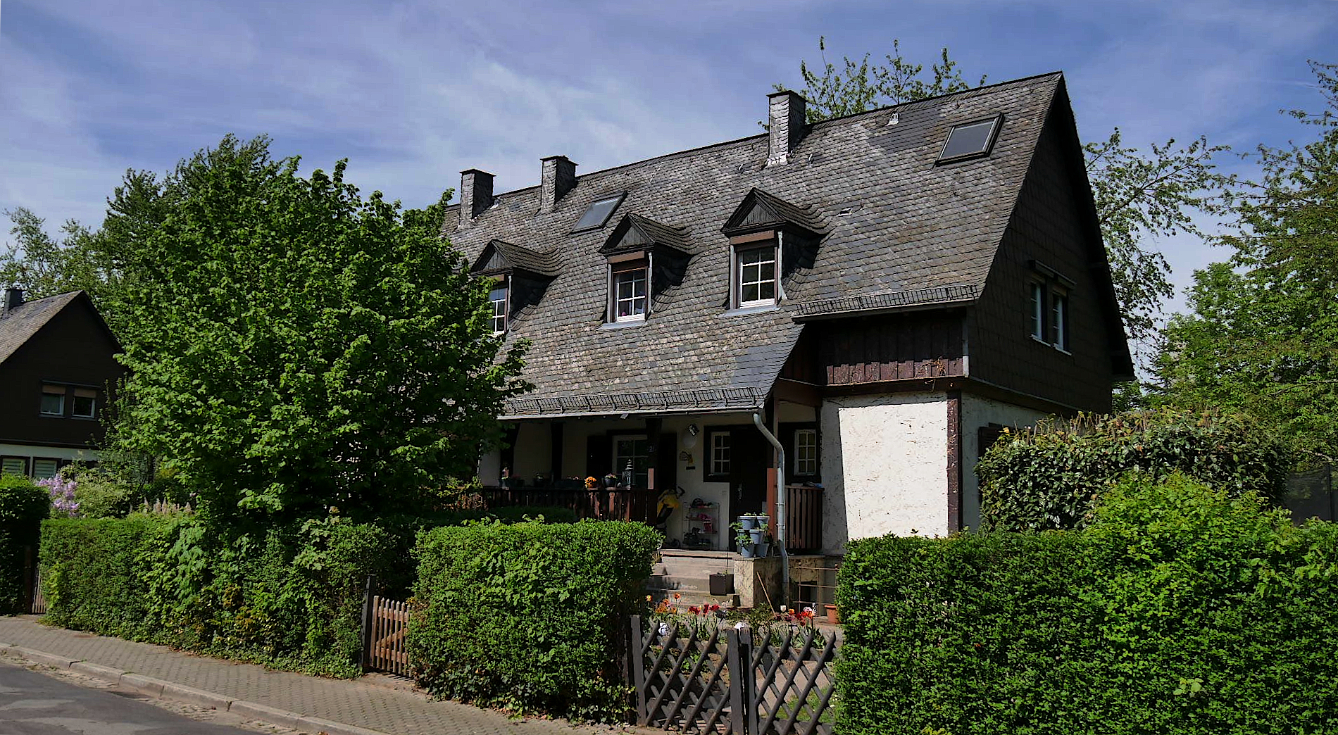 Französische Offizierssiedlung in Trier Nord (Hochwaldstraße und Wittlicher Straße). Das Bild zeigt die Wittlicher Straße.; traditionalistische Einfamilien- und Doppelhäuser in Holzrahmenbauweise, 1948–50; bauliche Gesamtanlage